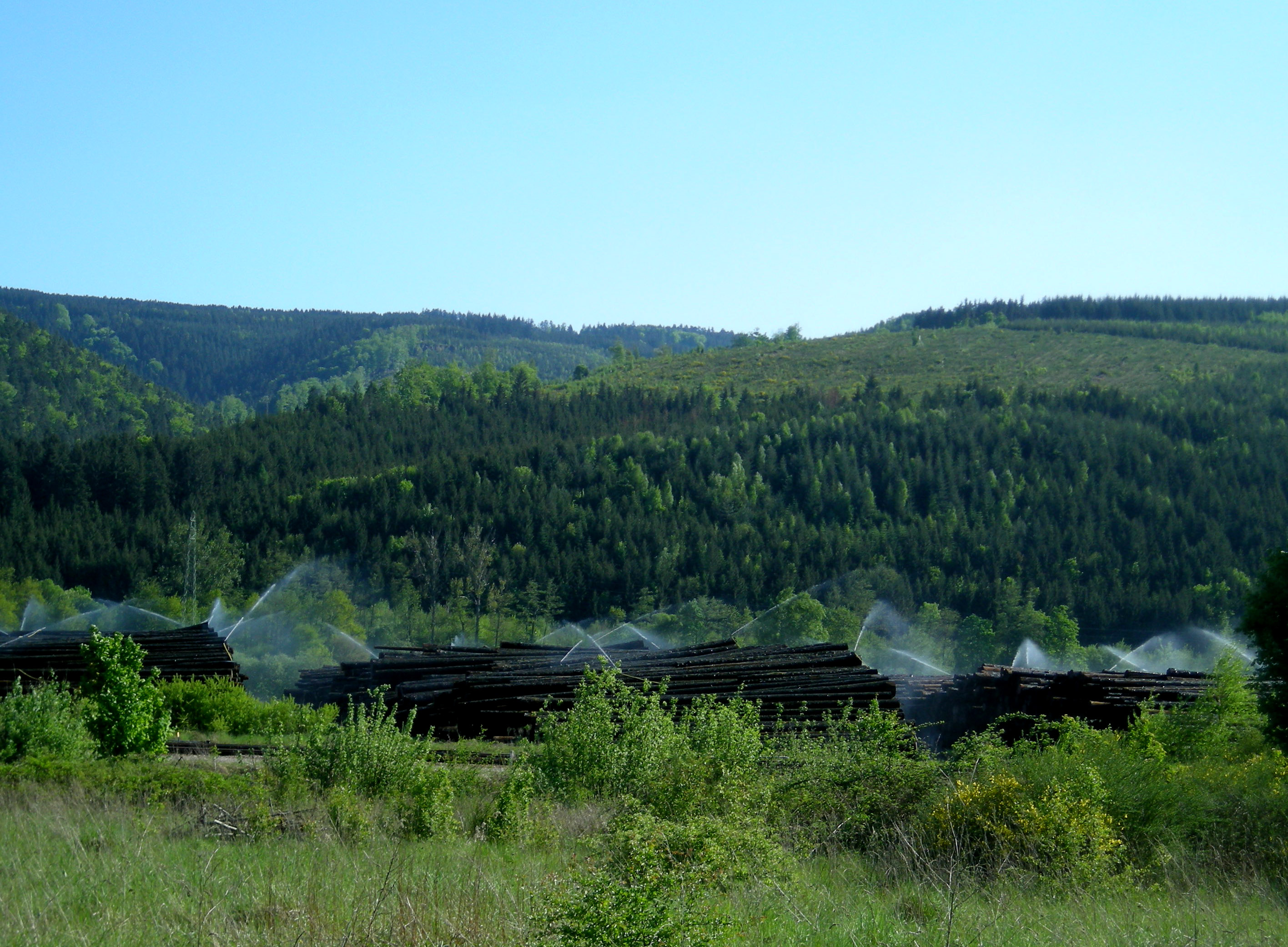 Arrosage de bois de scierie dans un environnement vallonné et boisé à Urmatt (Bas-Rhin)